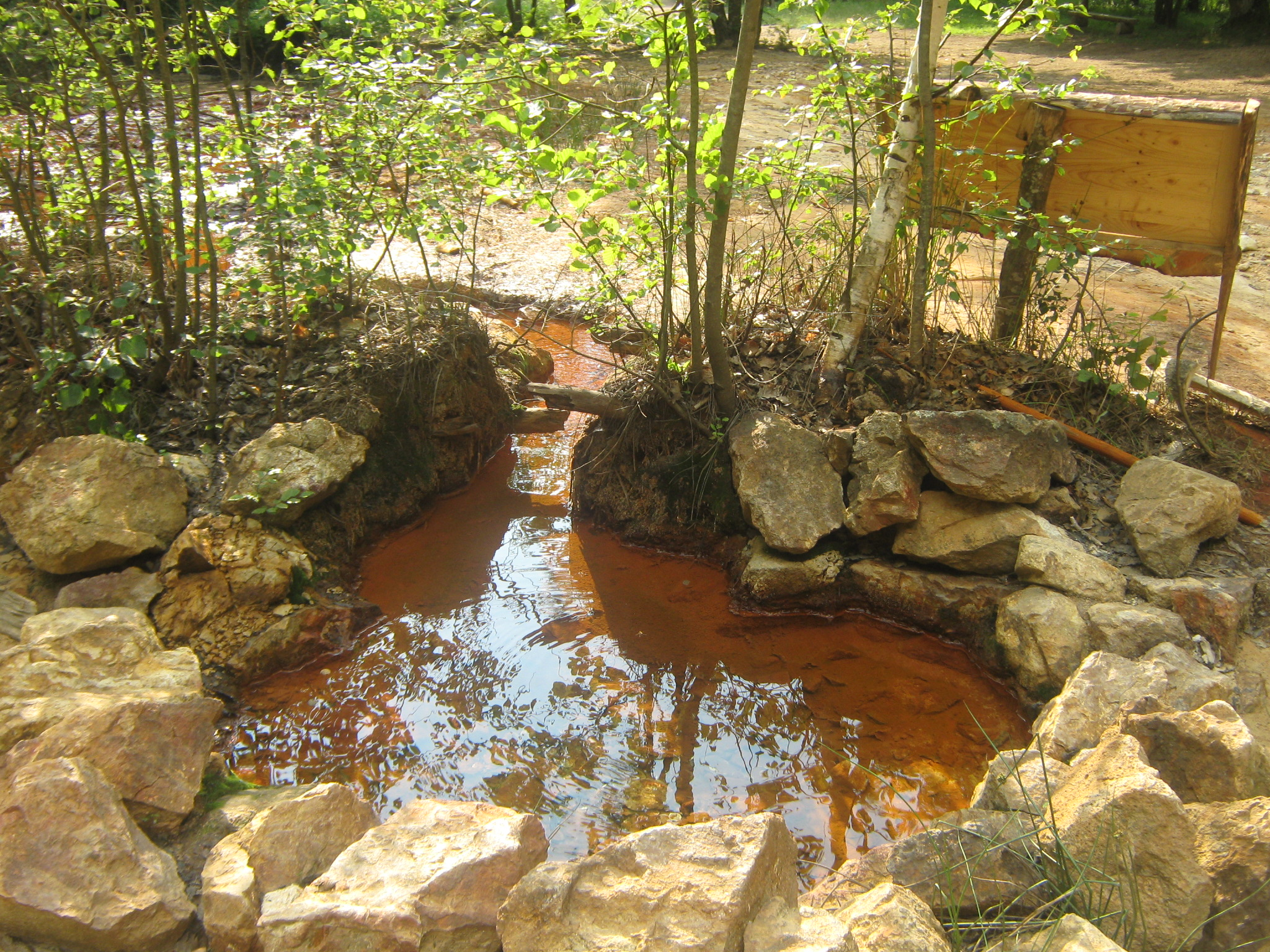 Ово је фотографија заштићеног природног добра у Србији под шифром: СП259 This is a a photo of a natural area in Serbia with ID: СП259 Споменик природе, Поред камених кула у Ђавољој Вароши има и извора. Једно од њих је и црвено врело.